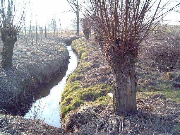 Limburgs: De Beëssebaek in Zjwier